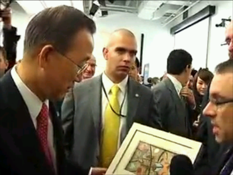 Il 18 ed il 19 novembre 2010, a New York, nel Palazzo di Vetro, sede delle Nazioni Unite (O.N.U.) per il progetto “Academic impact”, al quale erano presenti 130 università da tutto il mondo, per conto della delegazione italiana veniva donata ed acquisita nella Collezione delle Nazioni Unite, un'opera di Andrea Benetti, intitolata "Against violence". Il momento della consegna al Segretario Generale delle Nazioni Unite, S. E. Ban Kii-moon